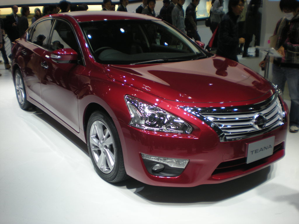 日産・ティアナ